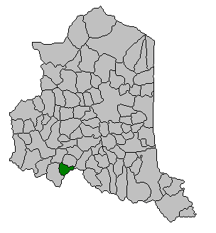 no original description